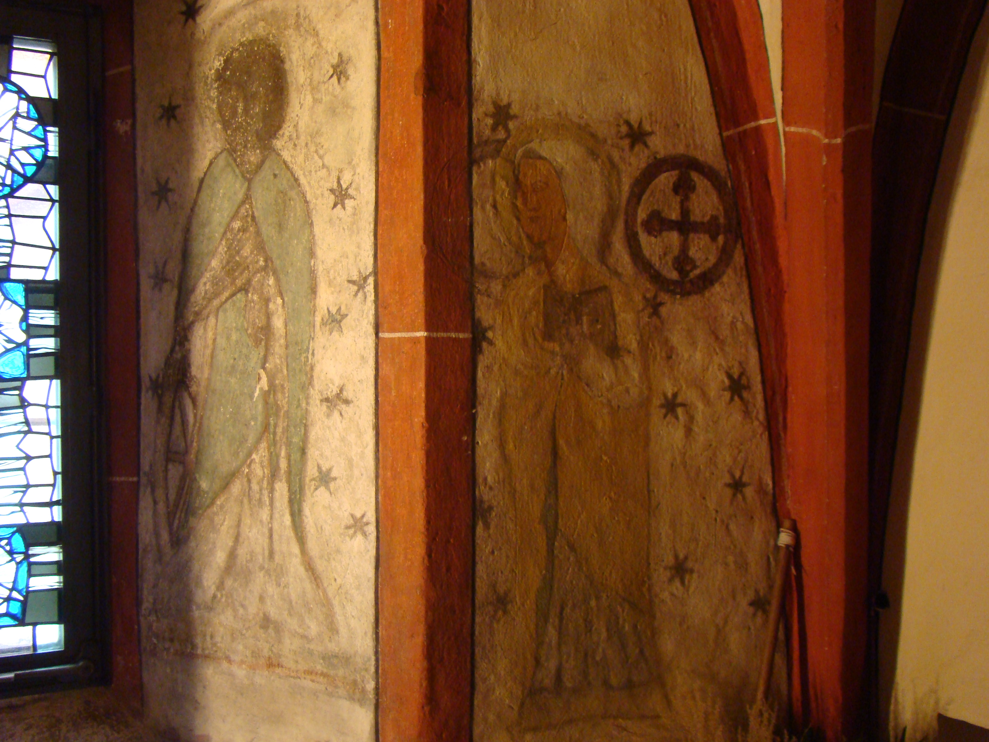 Pankratiuskapelle Altwiesloch: Wandmalereien in der Sakristei